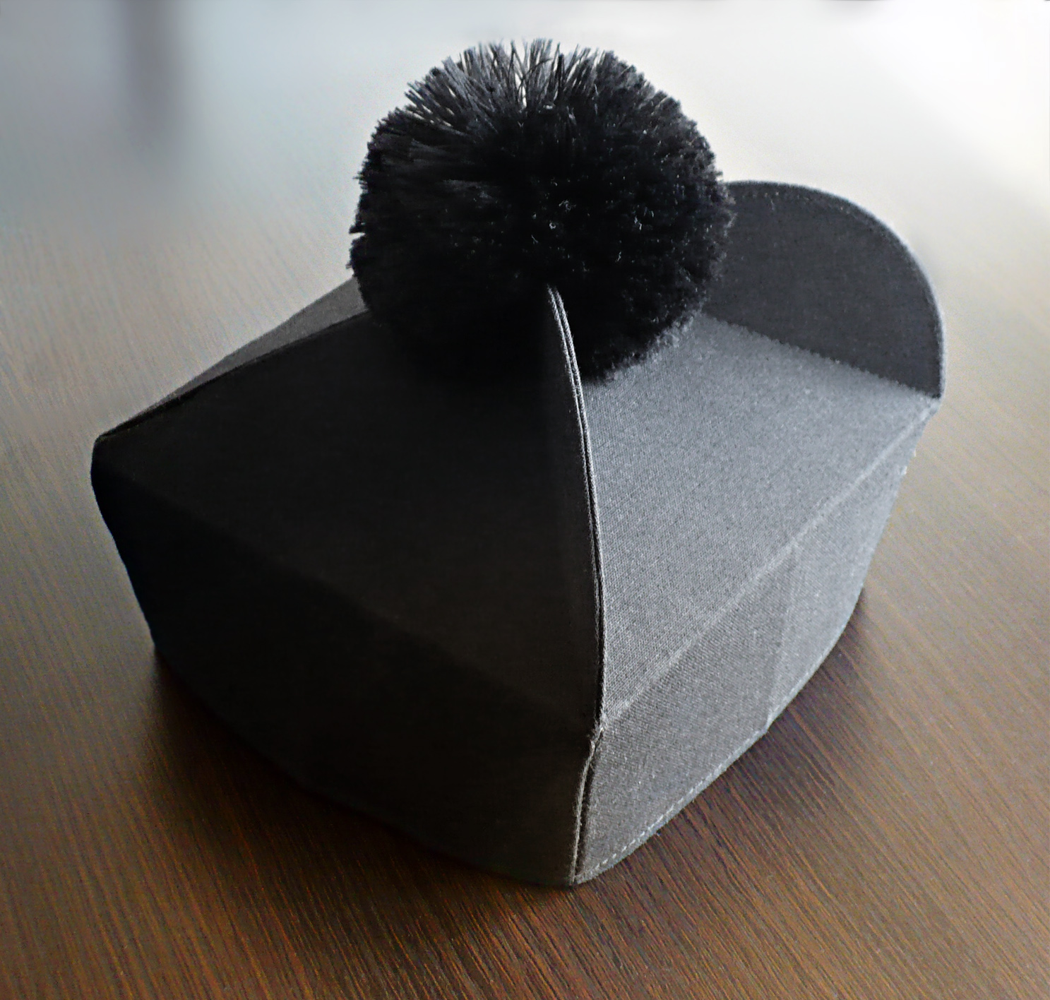 edycja grafiki oryginalnej.